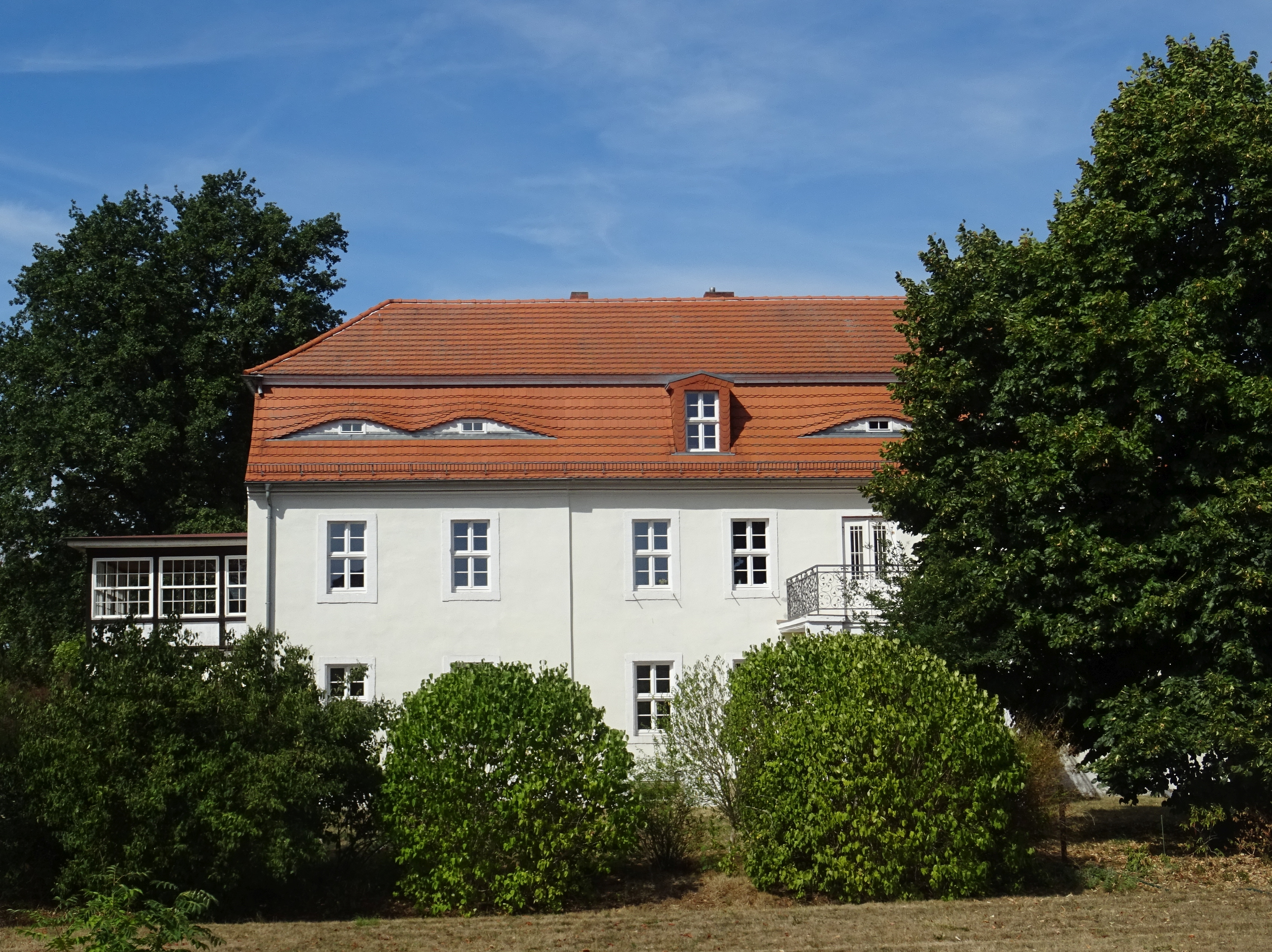 Plotha, denkmalgeschütztes Gutshaus, Orsteil der Stadt Belgern-Schikdau